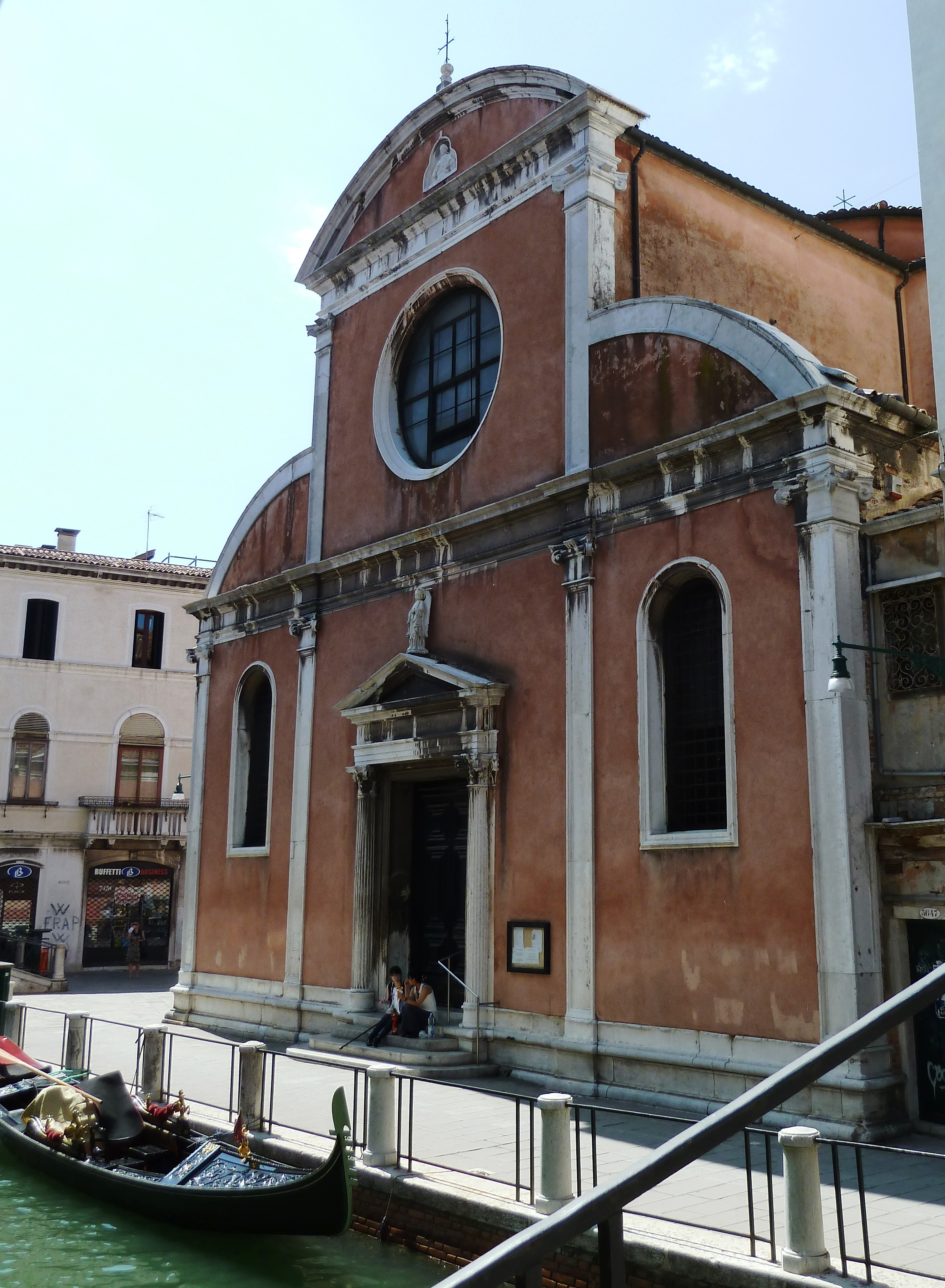 San Felice